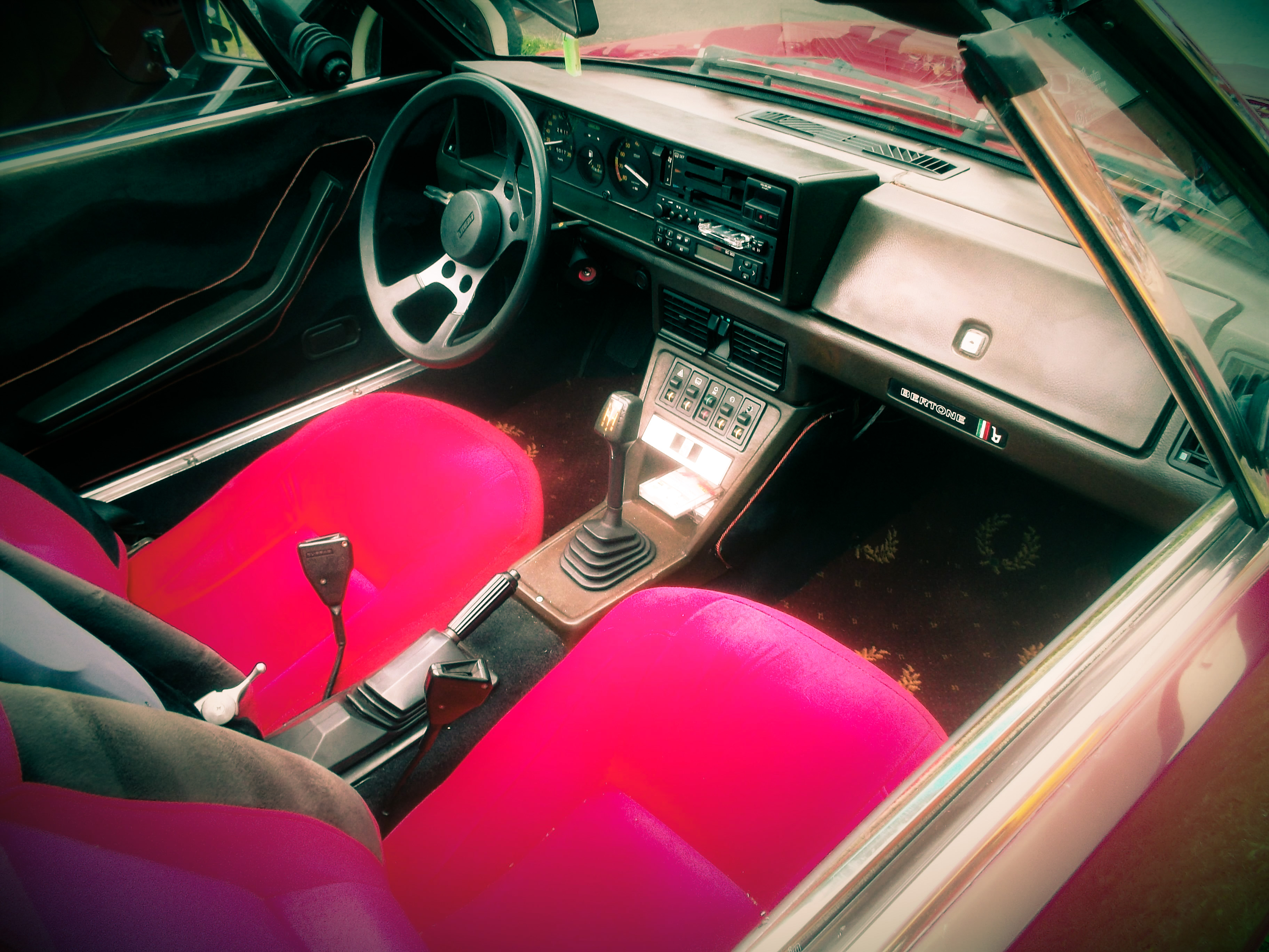 Ansicht der Vordersitze eines roten Fiat X 19 Cabrio mit schwarzem Verdeck (Baujahr 1972-1988)